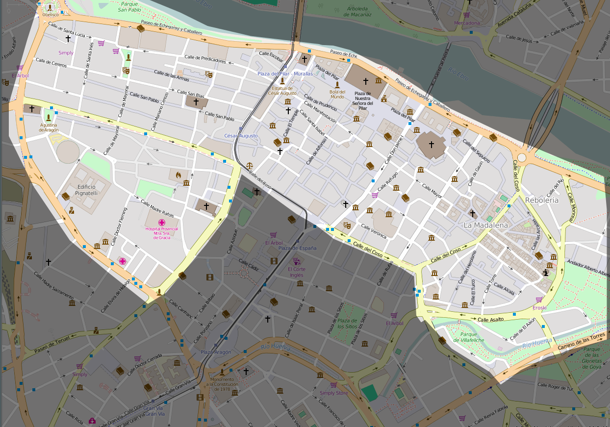 Mapa del distrito Casco Histórico en Zaragoza.